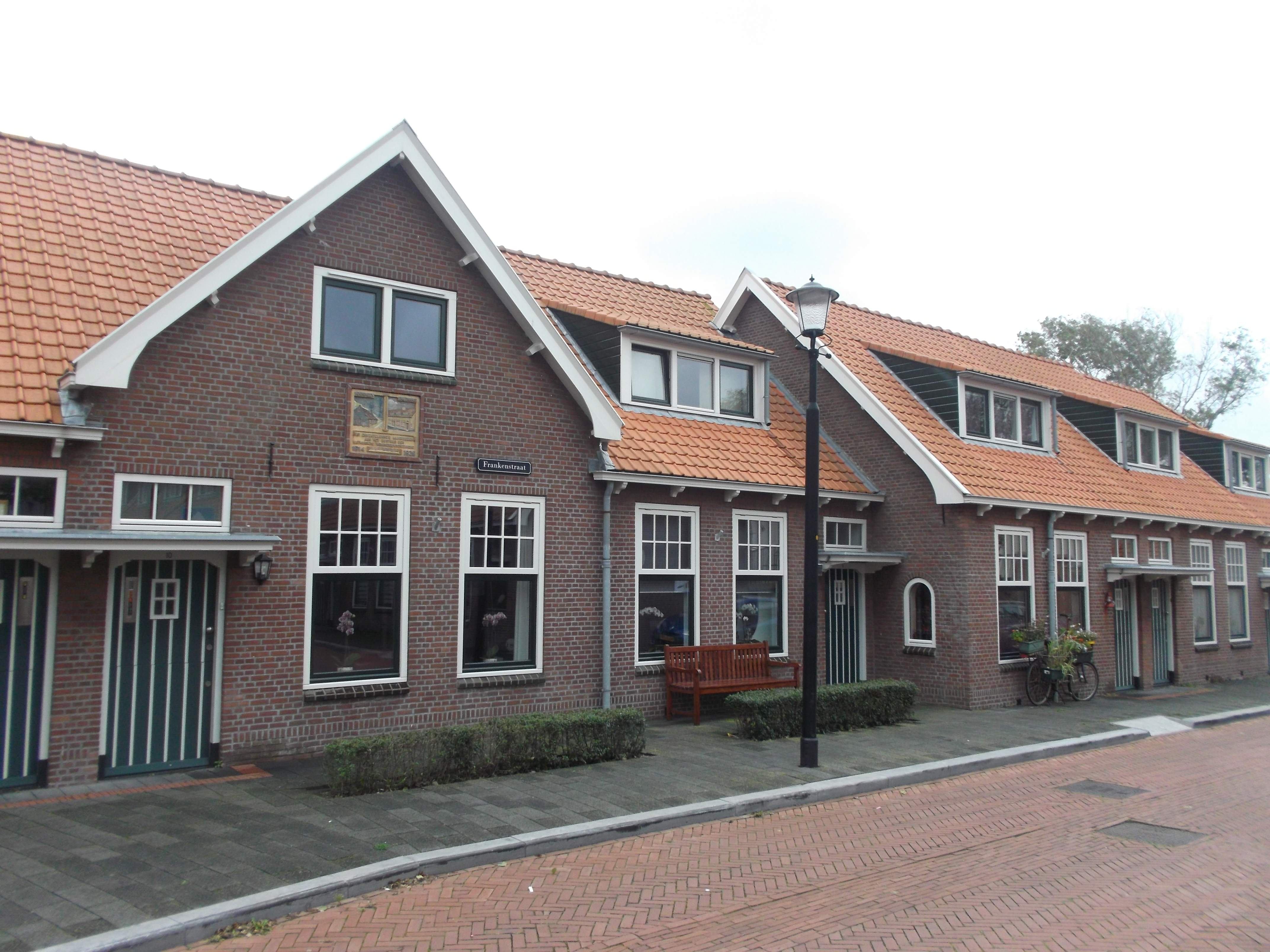 KZ 68